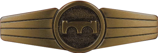 Tätigkeitsabzeichen für Pioniere der Bundeswehr Voraussetzungen: Fachbezogene Verwendung auf Dienstposten die den pionierspezifischen Werdegängen in Heer, Luftwaffe und Streitkräftebasis zuzuordnen sind. Stufe I, Bronze: Nach 6 Monaten Dienstzeit in fachbezogener Verwendung. Stufe II, Silber: Nach 5 Jahren fachbezogener Verwendung. Stufe III, Gold: Nach 10 Jahren fachbezogener Verwendung. Ausführung: Kreis mit stilisiertem Brückenelement, beidseitig mit vier Streifen eingefasst, metallgeprägt, bronze-, silber- oder goldfarben.